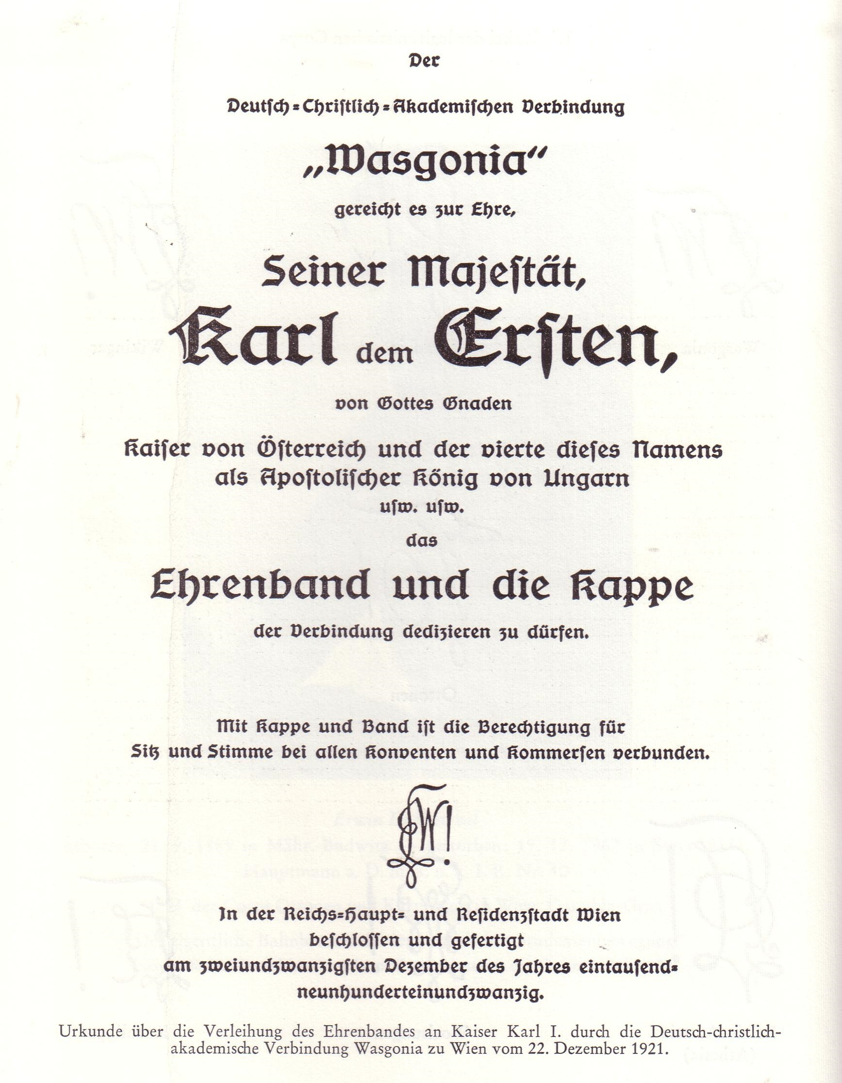 Verleihung des Ehrenbandes an Kaiser Karl I. durch die Deutsch-christlich-akademische Verbindung Wasgonia (Legitimistisches Corps in Wien)